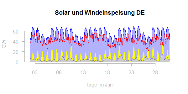 Last, Solar und Windeinspeisung DE mit Restlast (rot) im Juni 2016 (Daten ENTSO-E)